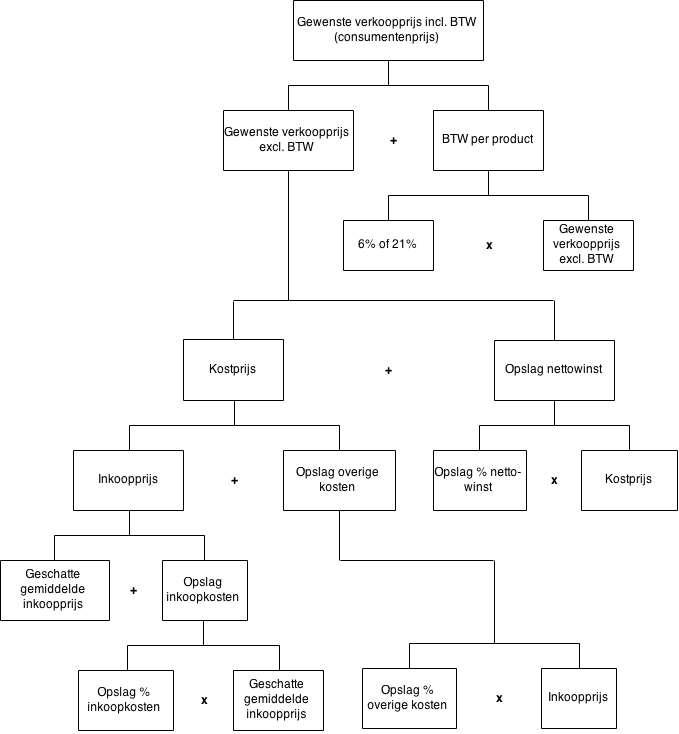 Schema voor het berekenen van de consumentenprijs.